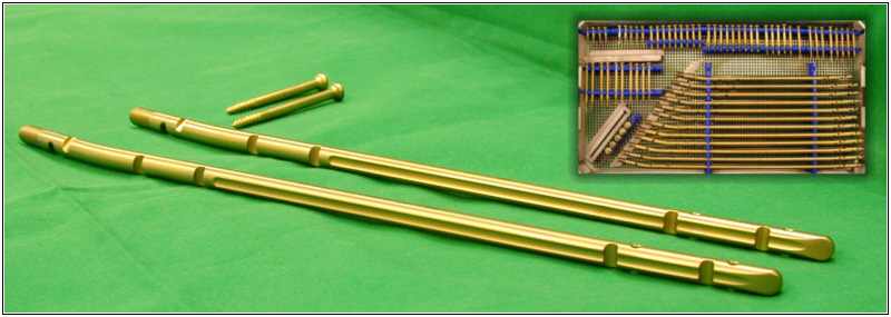 Nägel aus Titanlegierung zur Einbringung in das Schienbein samt Verriegelungsschrauben. In der oberen rechten Ecke habe ich - verkleinert dargestellt - das ganze Set aus verschieden langen Nägeln und Schrauben eingeblendet.